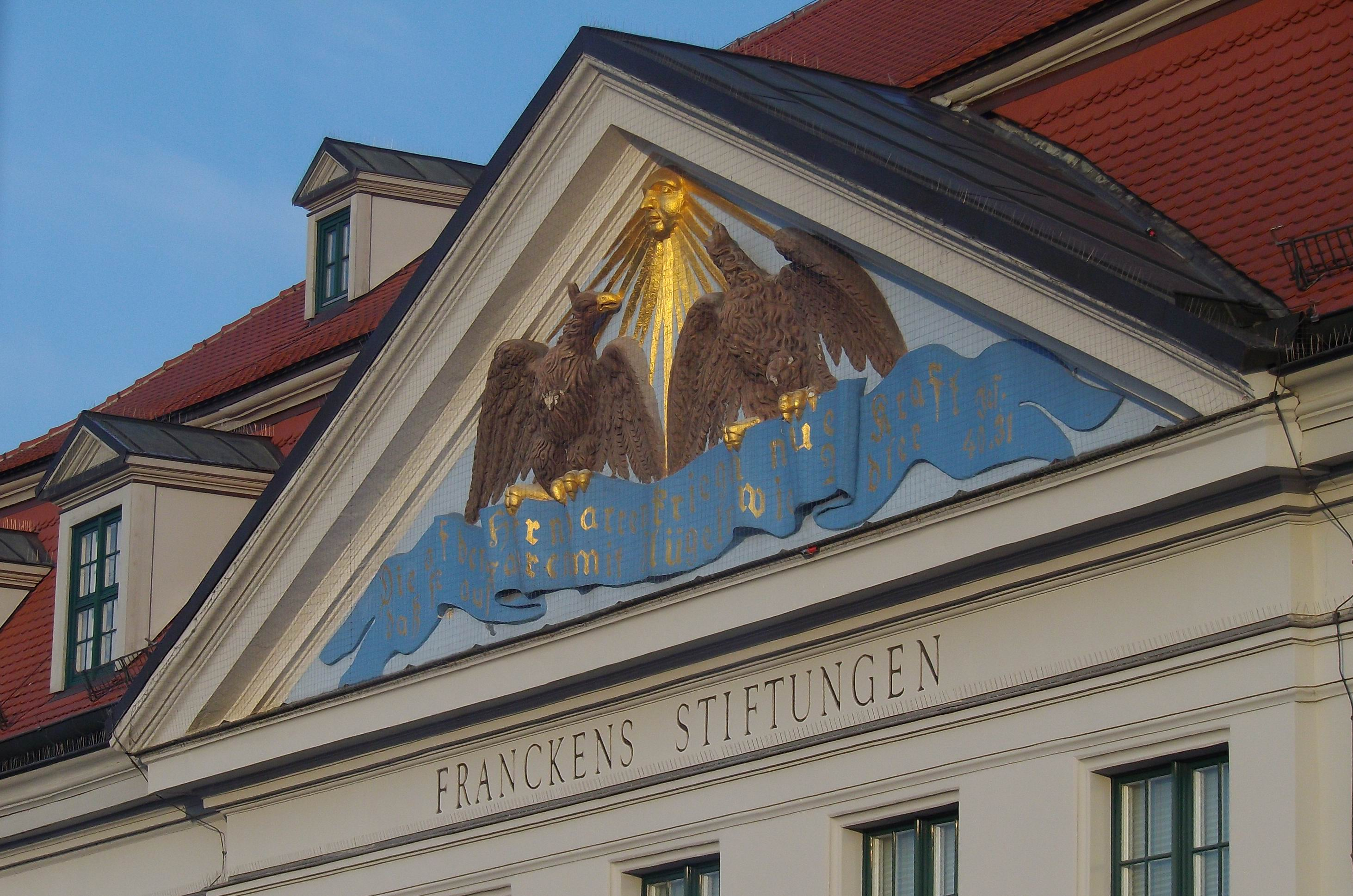 Adler am Giebel des Hauptgebäudes der Franckeschen Stiftungen in Halle (Saale)